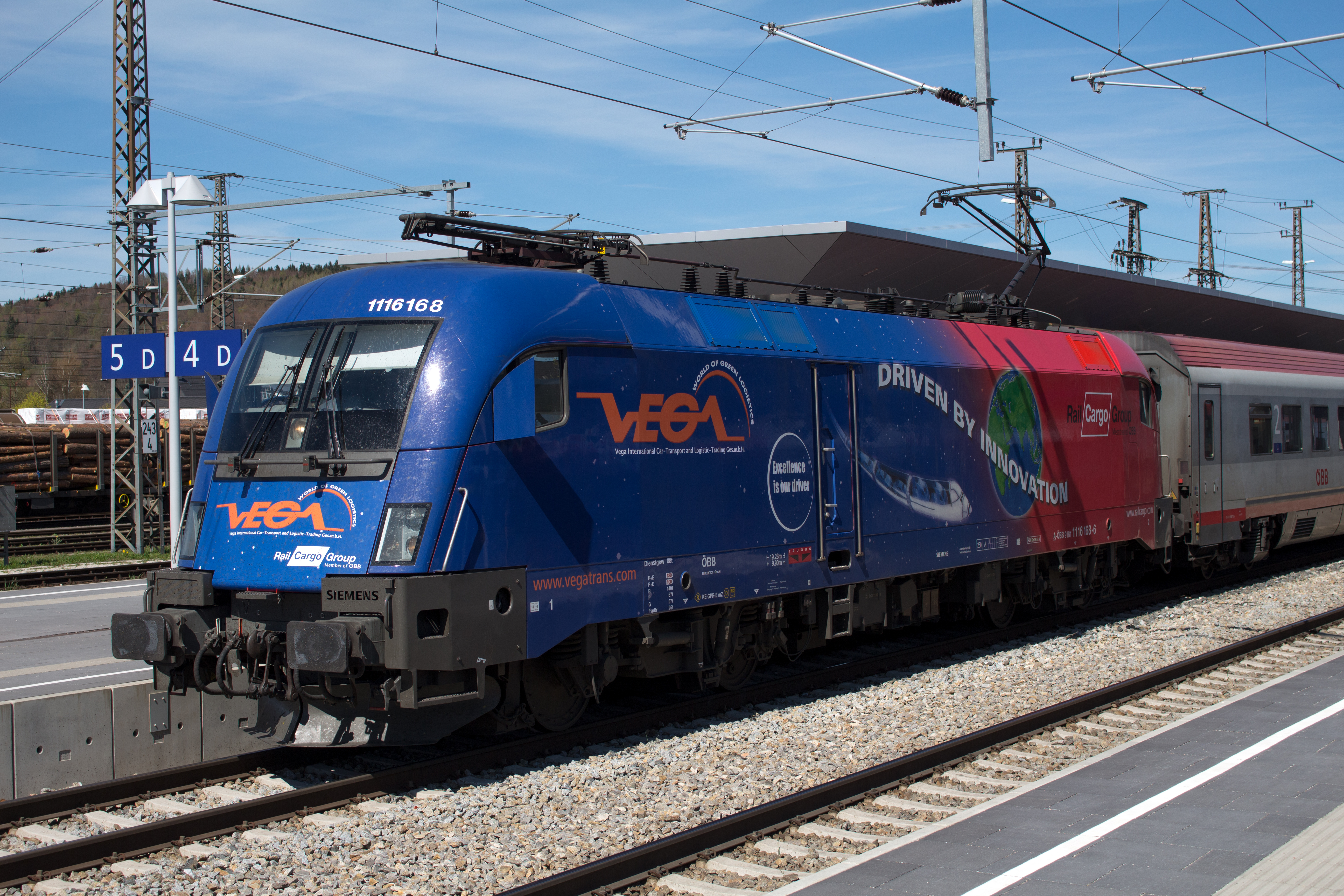 ÖBB 1116 168-6 "Vega" in Attnang-Puchheim, angehängt am IC 640 von Wien Westbahnhof nach Salzburg Hauptbahnhof. ÖBB "Vega" 1116 168 in Attnang-Puchheim